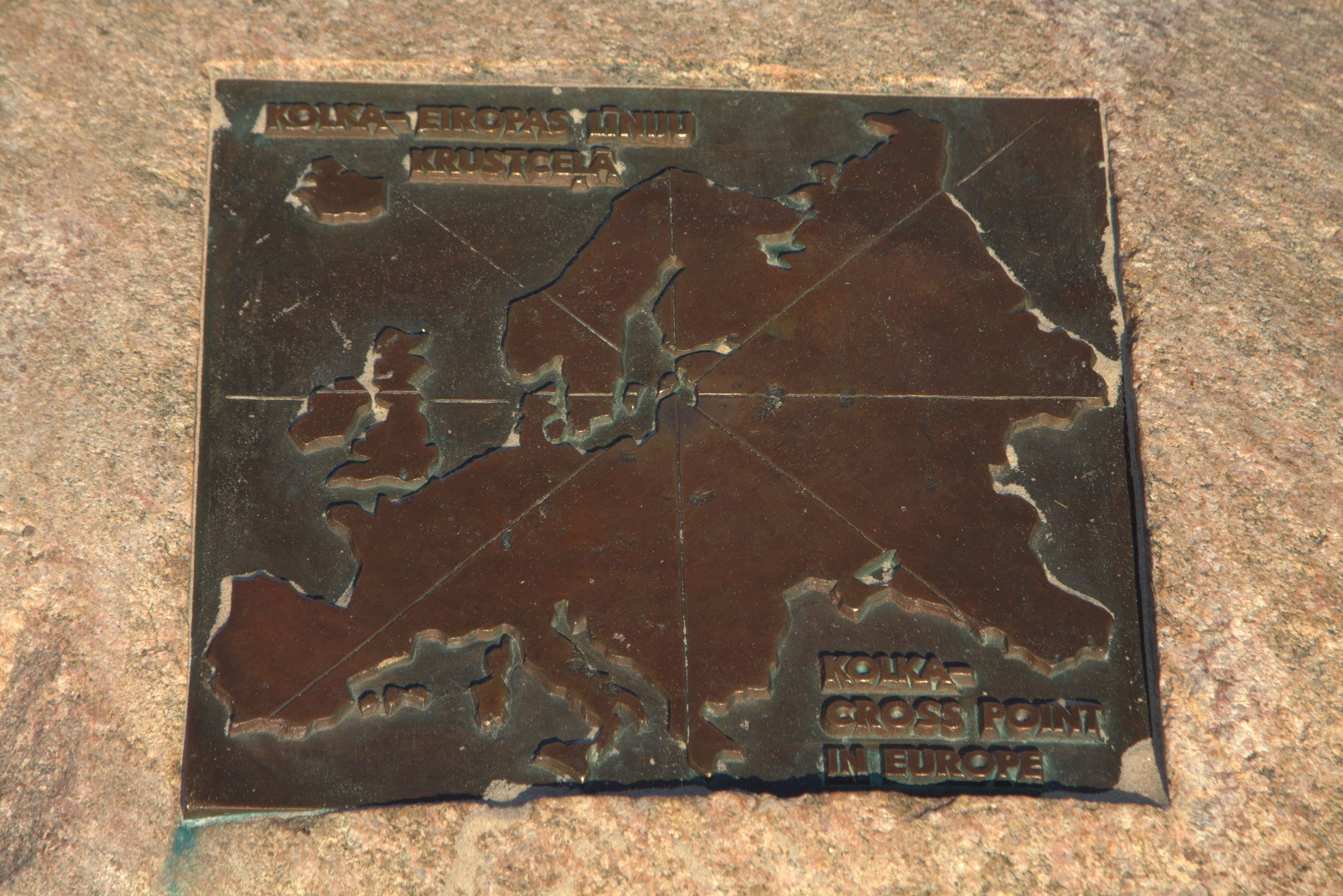 Мыс Колка - самая северная точка Латвии.